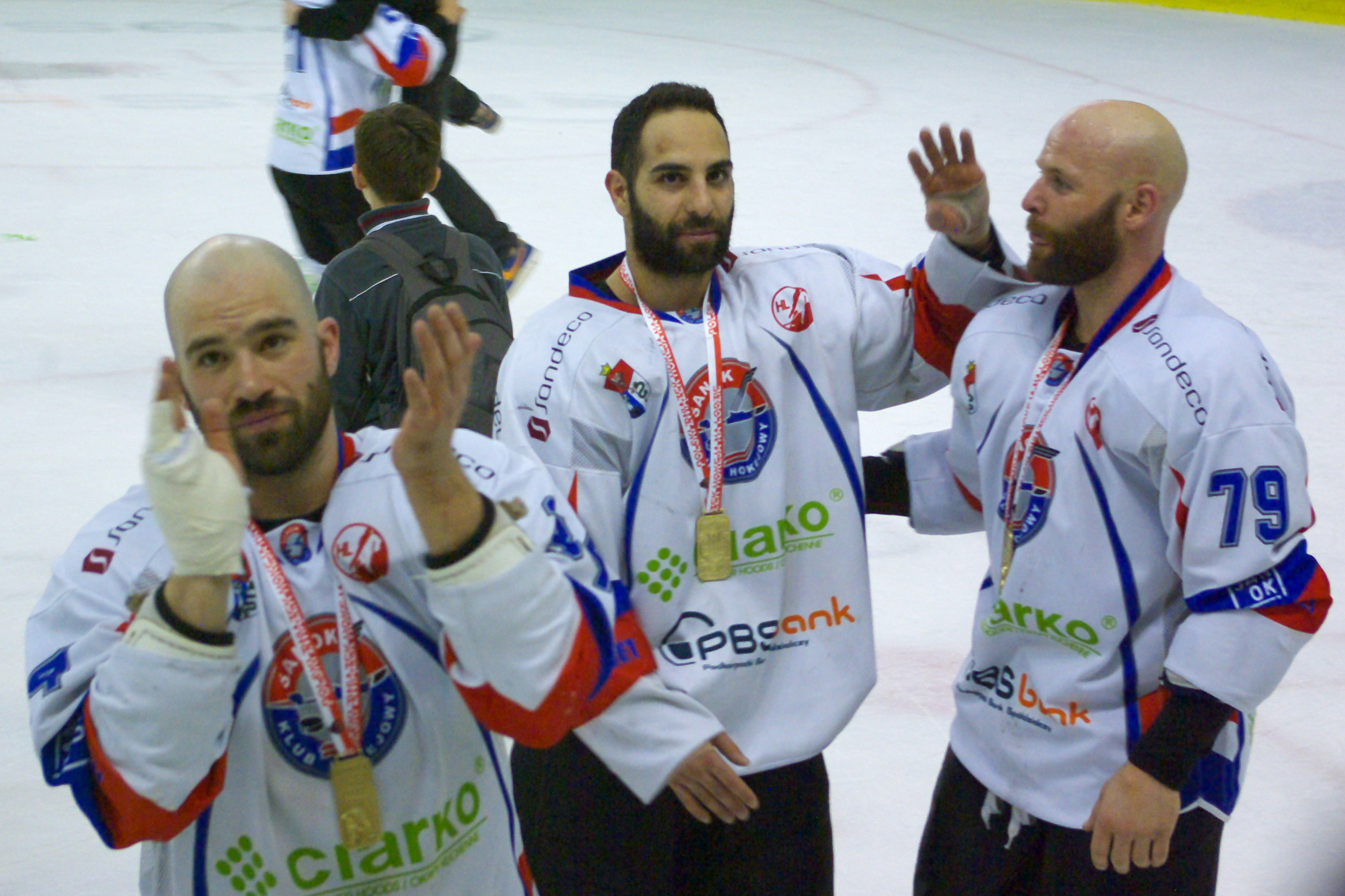 Szósty mecz finałowy o mistrzostwo Polski w hokeju na lodzie w sezonie PHL 2013/2014: Ciarko PBS Bank KH Sanok – GKS Tychy (2:0), 3 kwietnia 2014 w Sanoku (Arena Sanok). Mike Danton, Samson Mahbod, Mike Bayrack